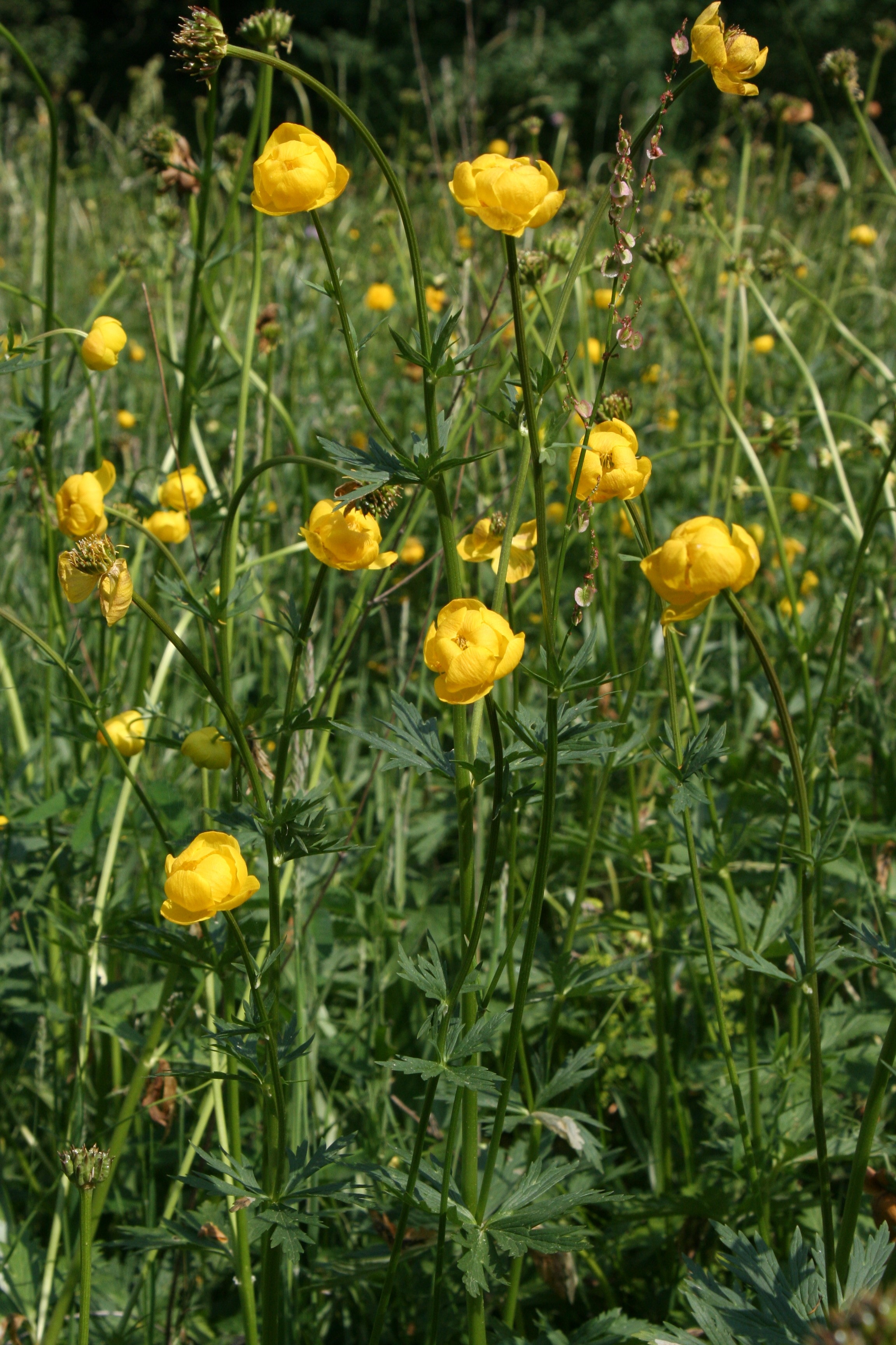 Trollblumen (Trollius europaeus), fotografiert in Schwäbisch Hall-Wackershofen